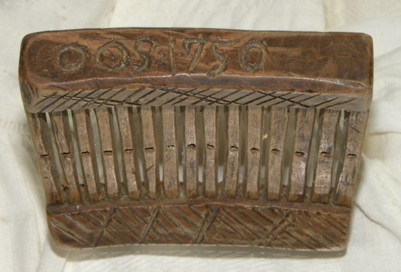 Vävredskap från Gagnef, Dalarna. Handgjord bandgrind från 1750.